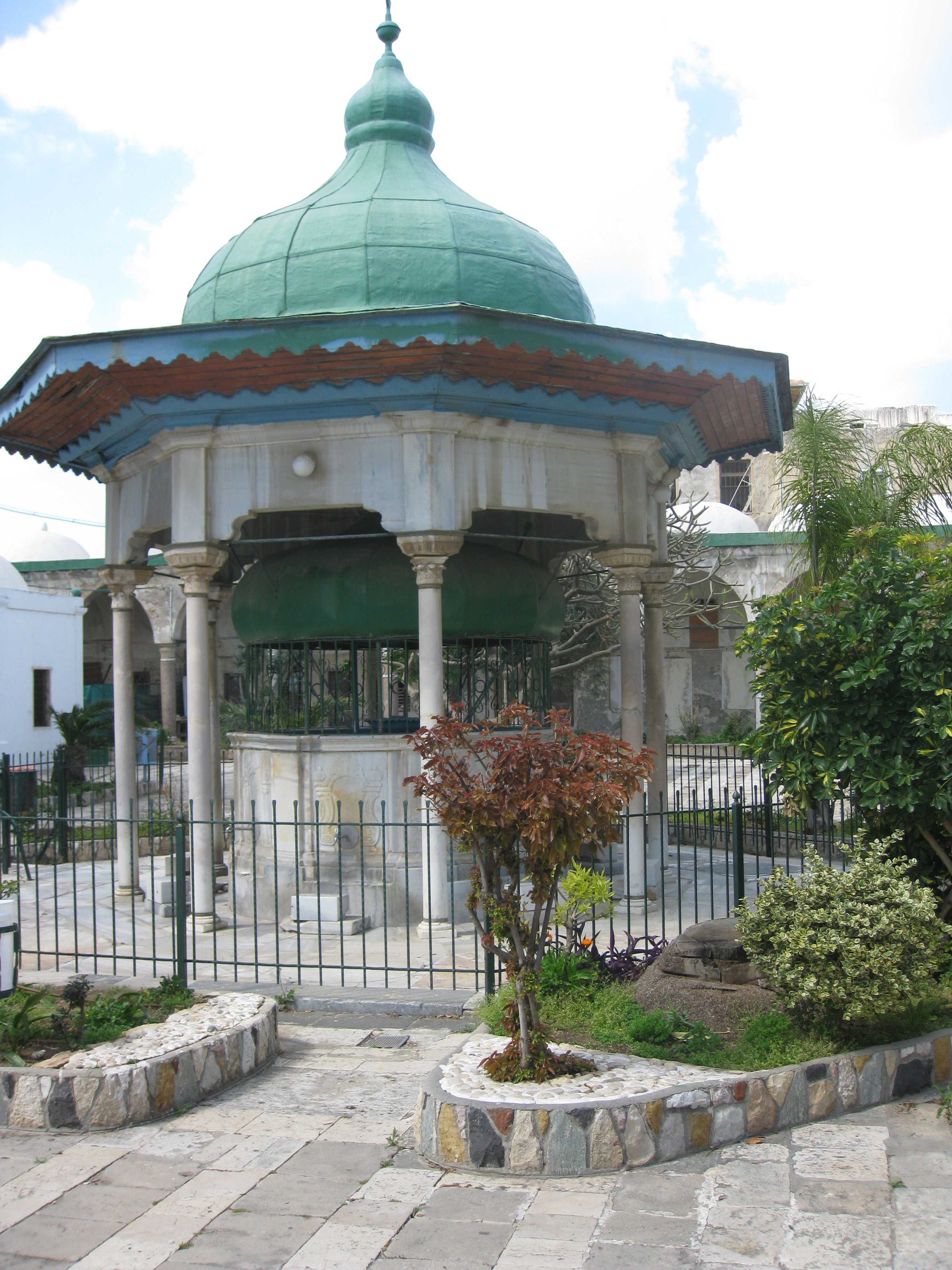 Al Jazar Mosque מסגד אל ג'זאר בעכו